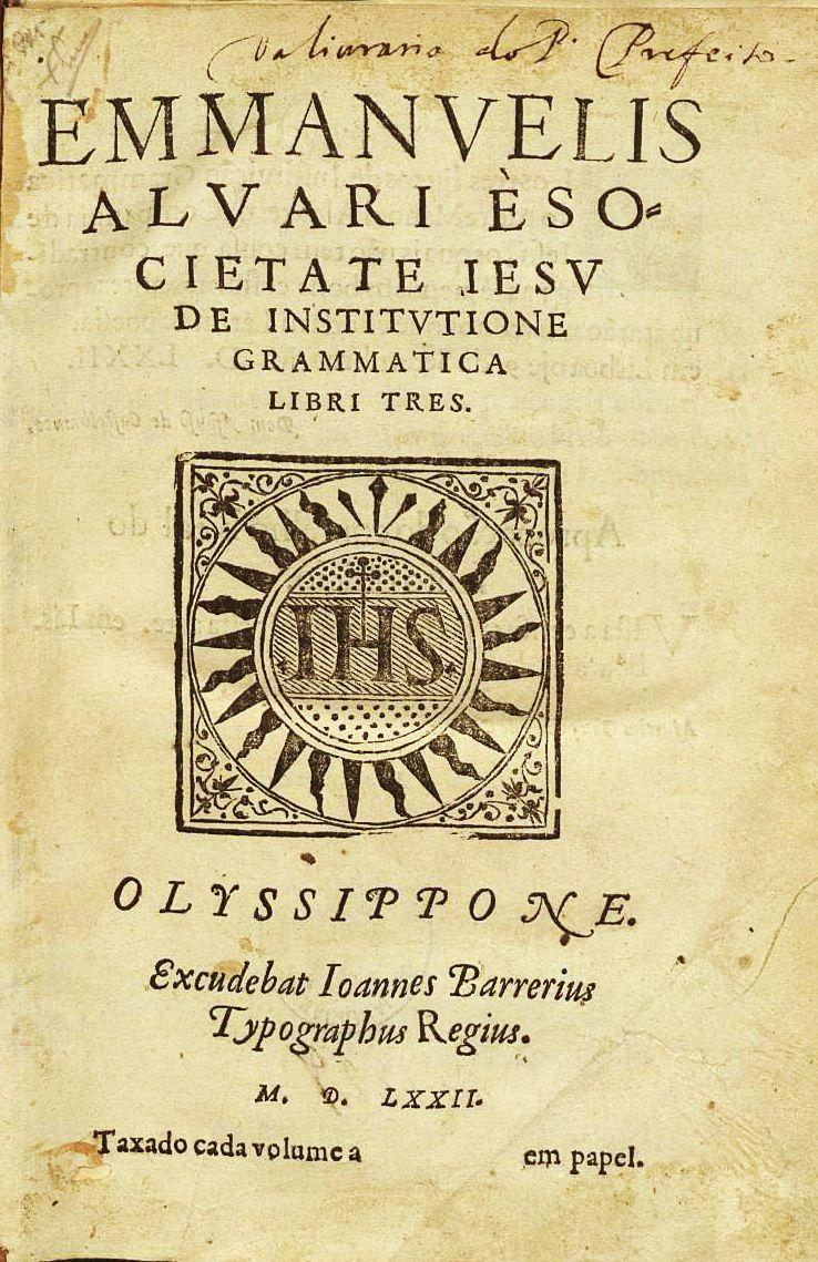 Padre Manuel Álvares (1526; 1583),De Institutione Grammatica. Lisboa, 1572, Portugal. Olyssiponne: Ioannes Barrerius, 1572. Biblioteca Nacional de Portugal (Res. 1621 P), Lisboa, Portugal